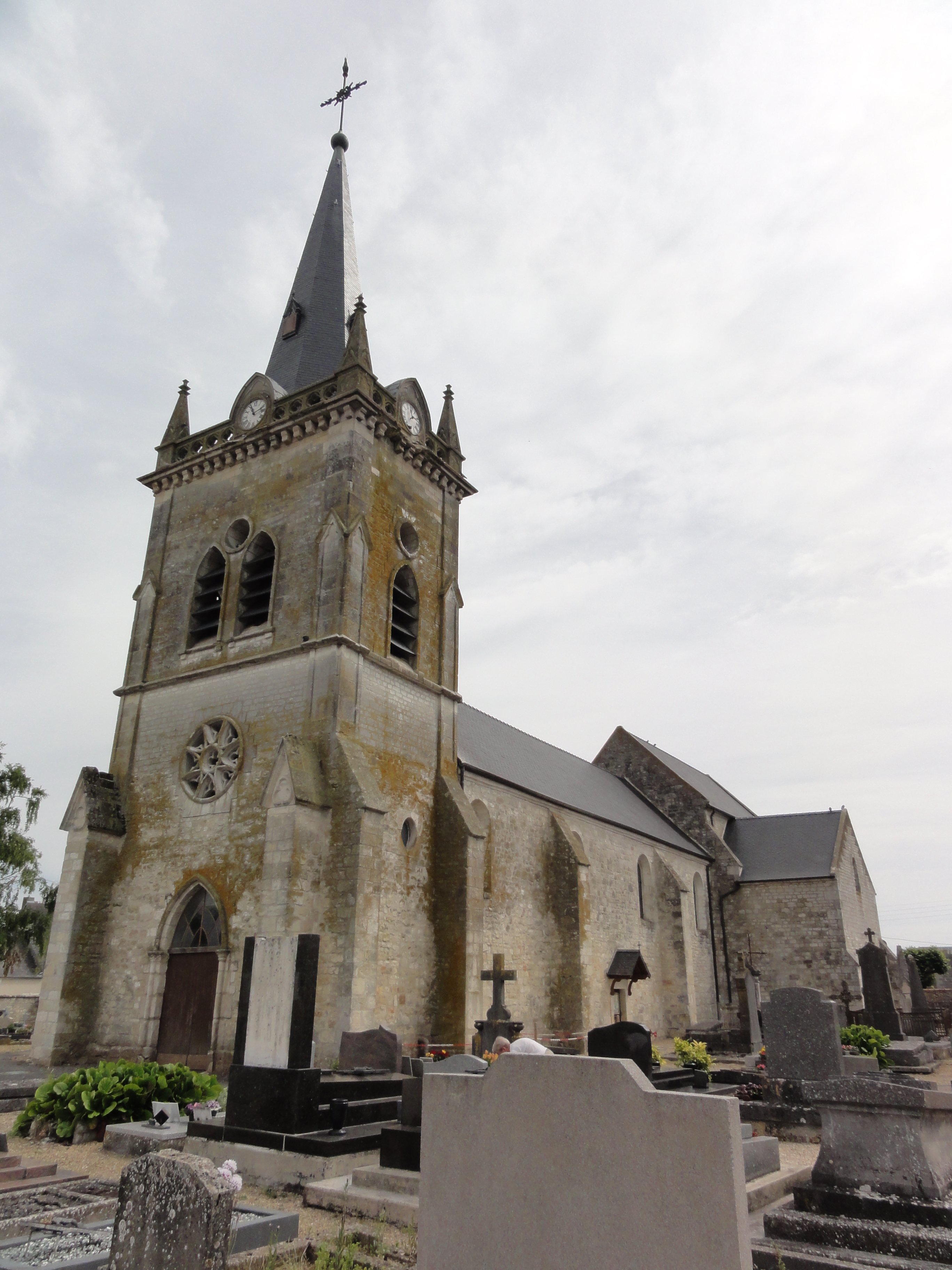 Dizy-le-Gros (Aisne) église